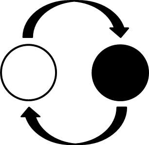 Logo der Partei für Gesundheitsforschung